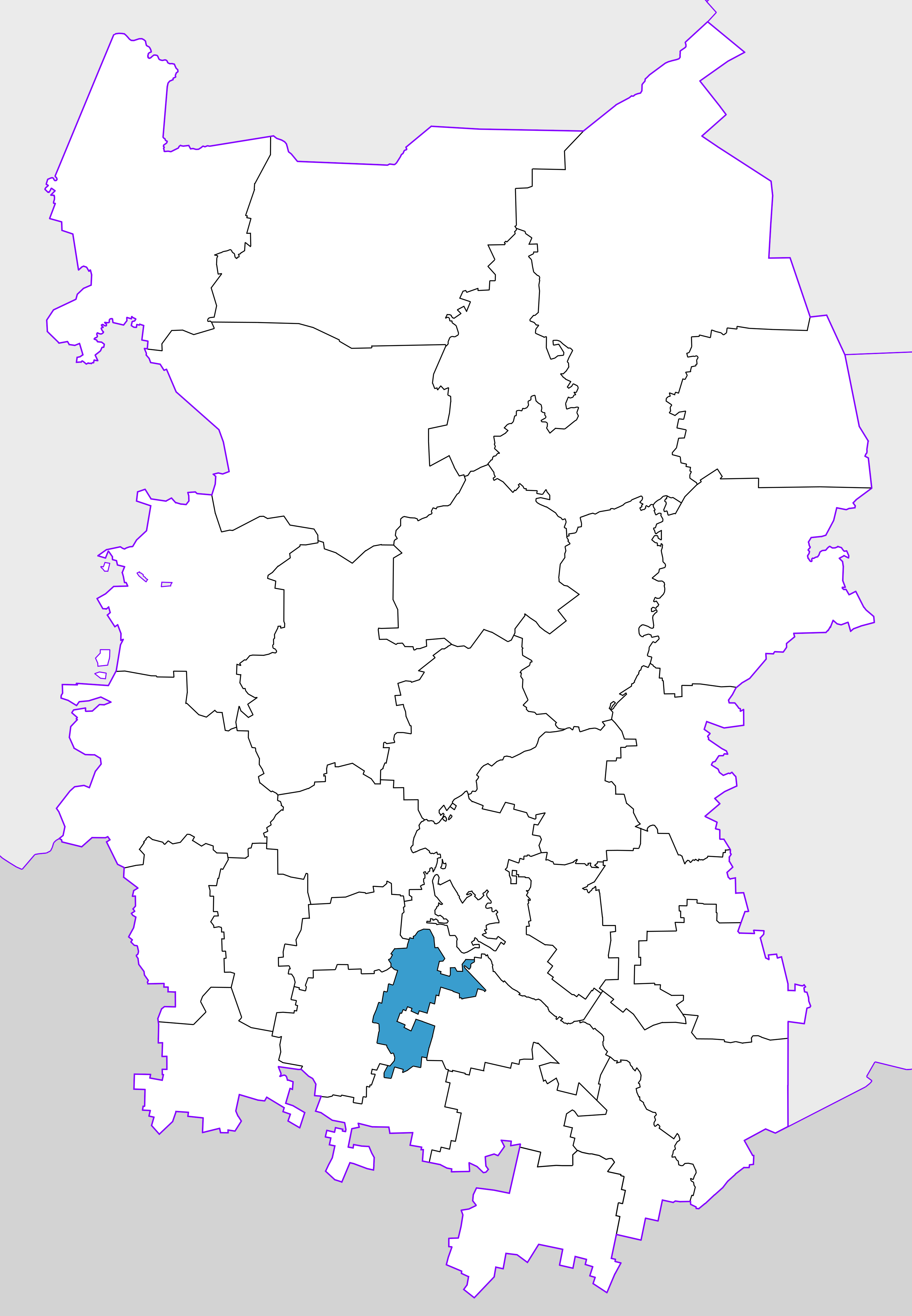 Азовский немецкий национальный район Омской области